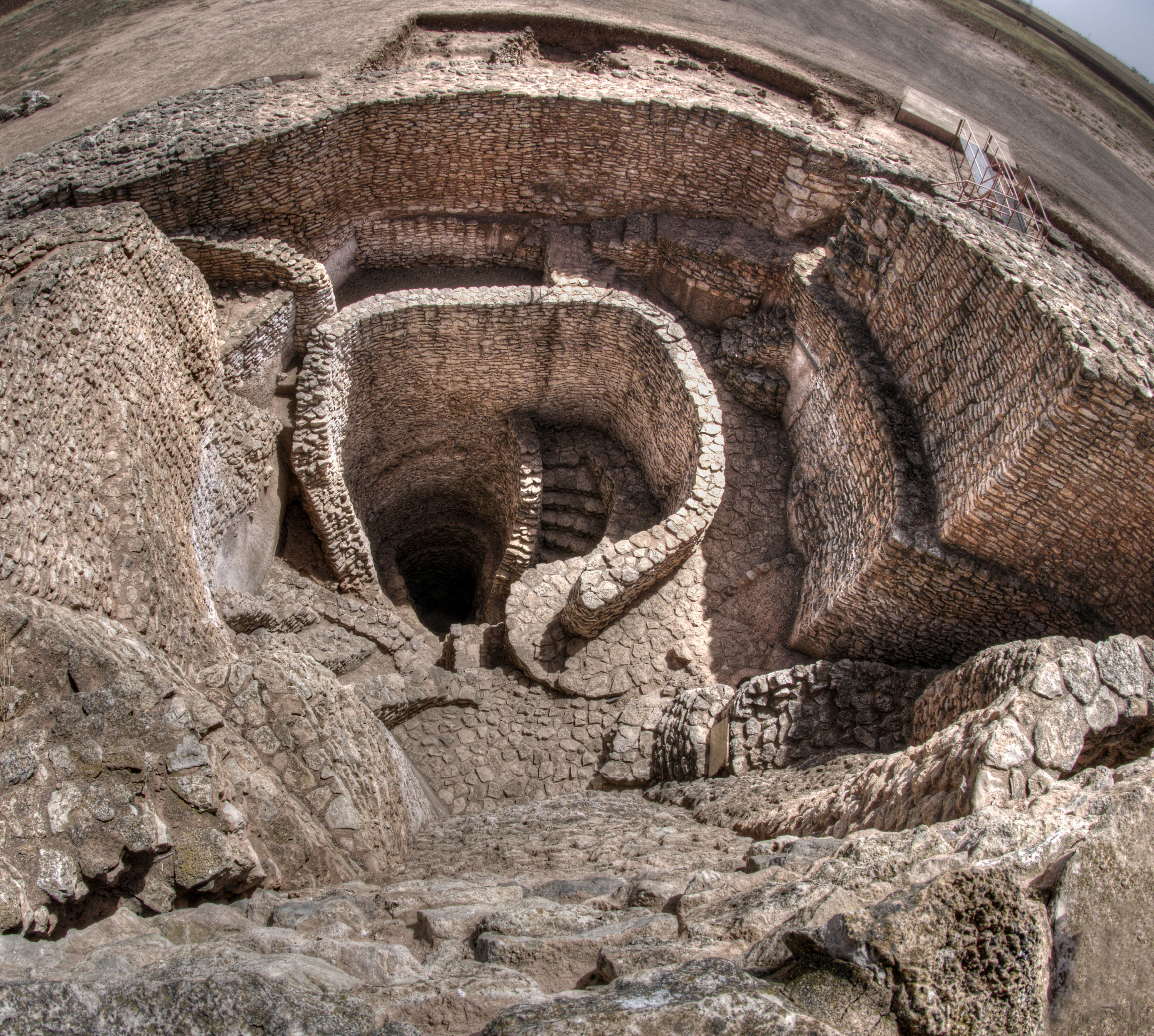 Las "motillas" son yacimientos fortificados de la Edad del Bronce datados en el periodo entre los años 2200 y 1500 a.C. Son específicos de zona de La Mancha, donde se ha localizado una veintena. La Motilla del Azuer es la única visitable en este omento. Está en Daimiel y es una construcción compleja con varias murallas, pasillo tortuosos y un gran patio donde se ubica un pozo, descubierto y excavado recientemente.El poblado es exterior a las murallas y dentro de la motilla aparecen estancias que sirvieron de almacenes de grano. Posiblemente se trataba de una estructura de refugio y defensa, no preparada para ser usada como vivienda durante largos periodos. La foto muestra el pozo desde la torre central.